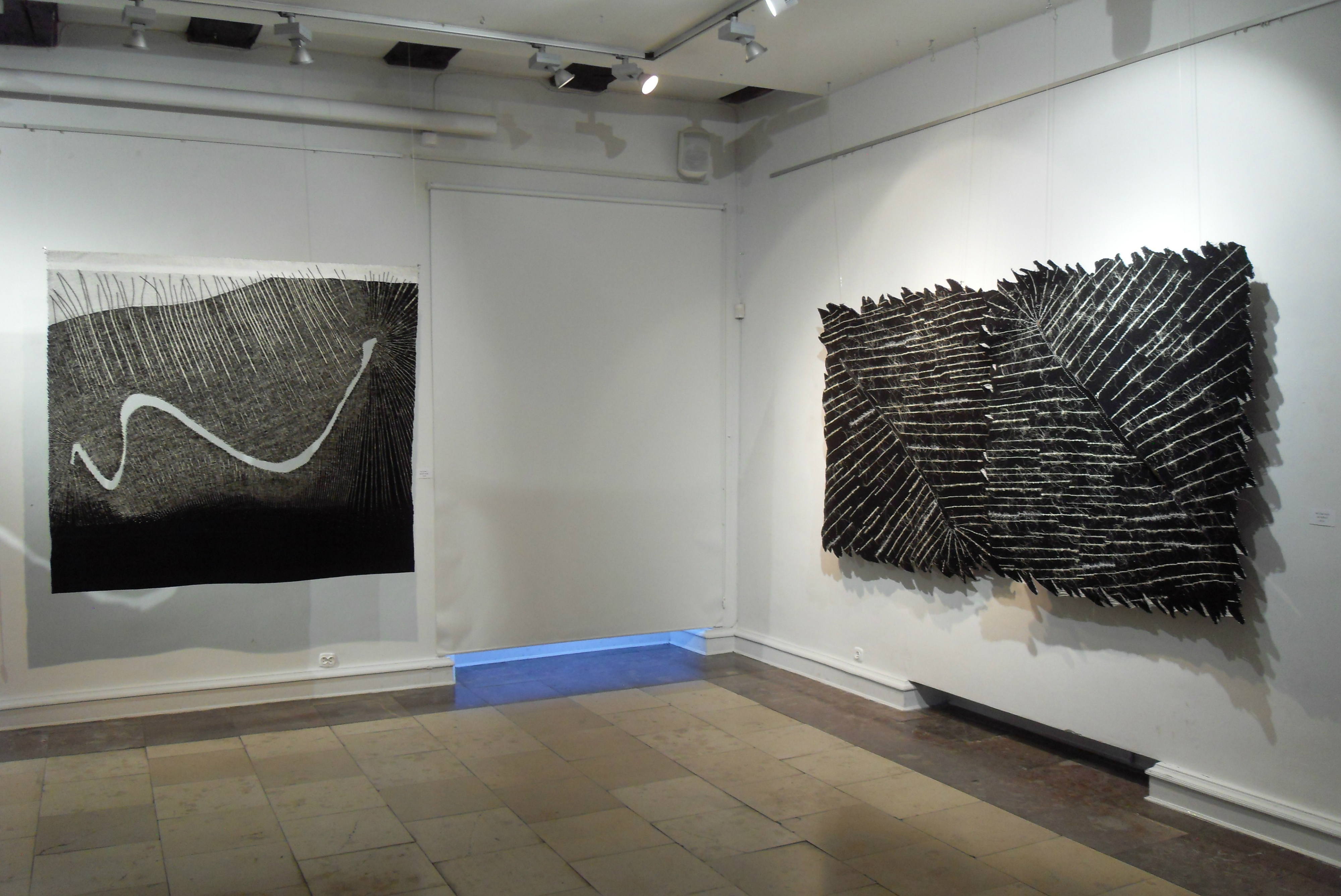 Nadbałtyckie Centrum Kultury (Ratusz Staromiejski) w Gdańsku. Wystawa tkaniny artystycznej, autor: Włodzimierz Cygan, prace: "Widziane z..." i "Nic dwa razy".